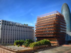 Recinto de Can Tiana, distrito 22@, en la c/ Bolivia, 56 de Barcelona